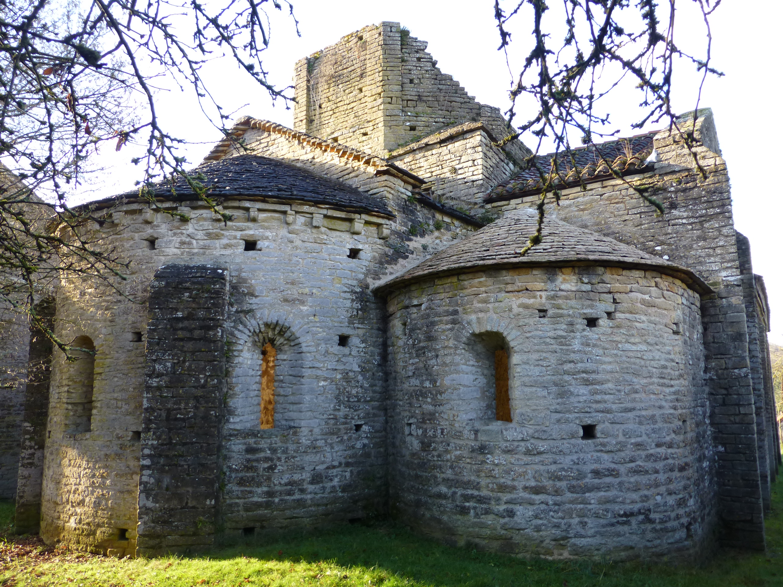 Le puley : le choeur du prieuré - vue extérieure